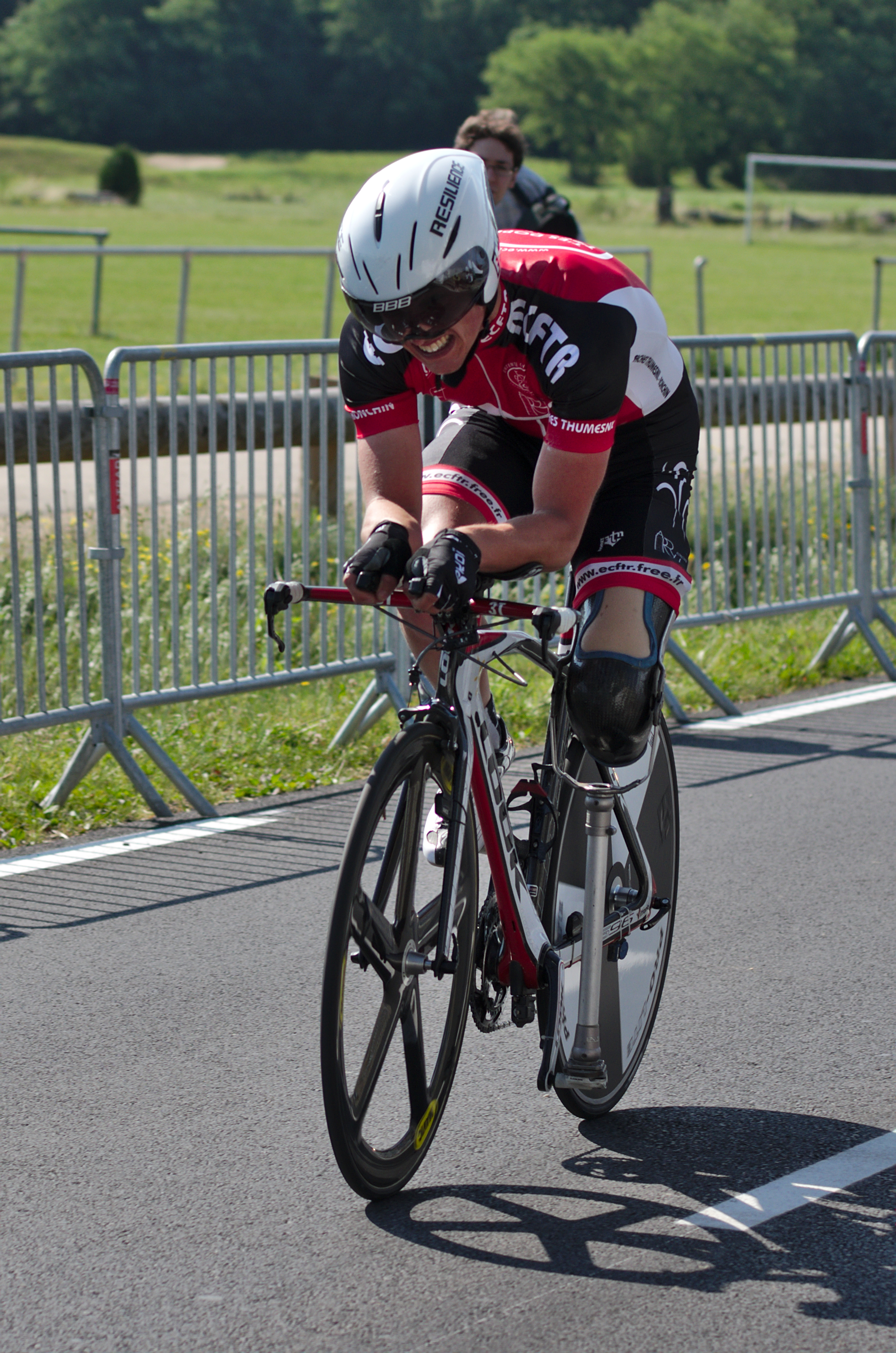 Championnat de France de cyclisme handisport - 20140615 - Contre la montre